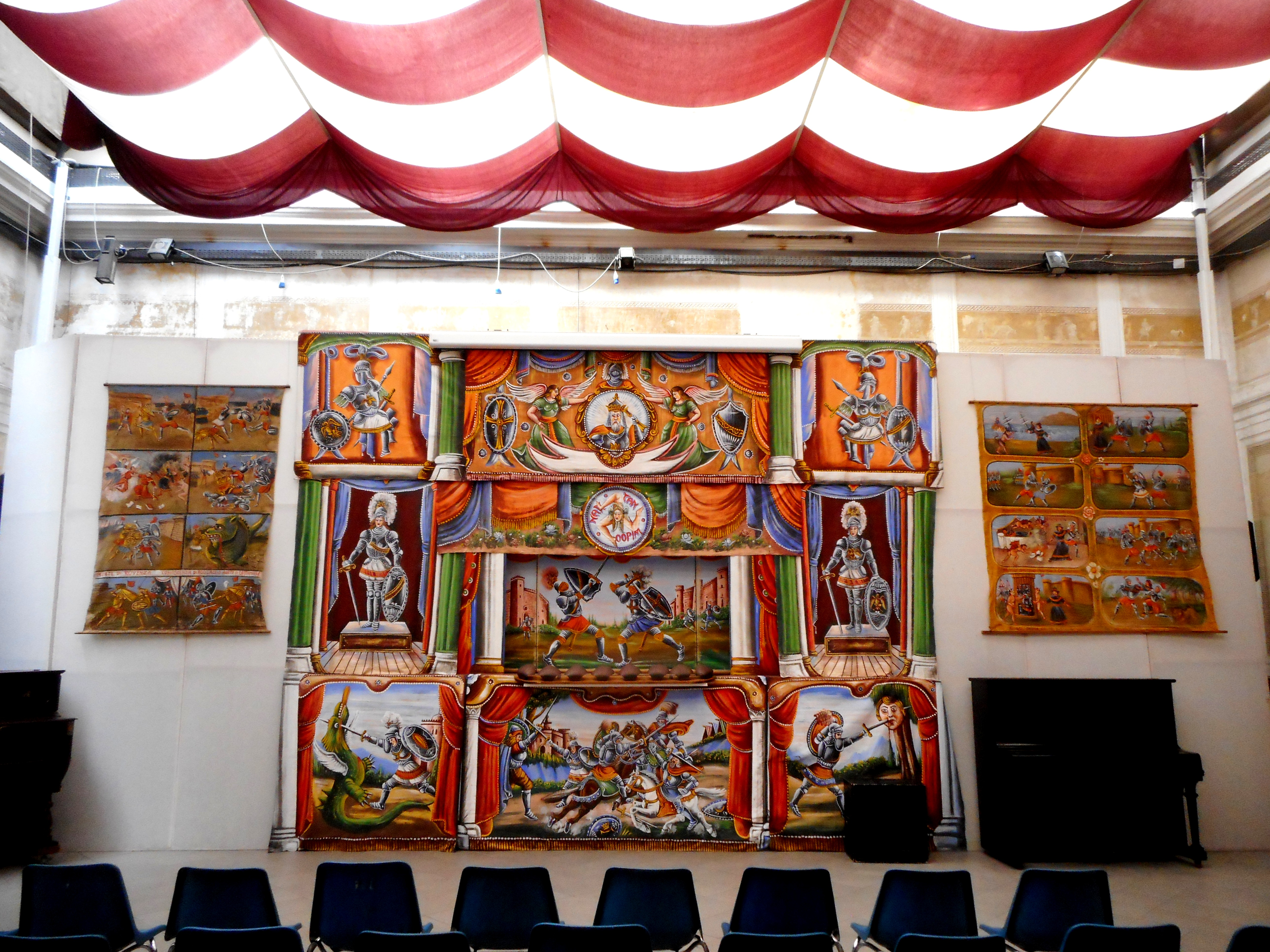 Salone del Museo delle Marionette "Antonio Pasqualino"